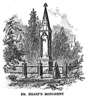 marker for Daniel Sharp (1783 - 1853), minister, in Mt. Auburn Cemetery